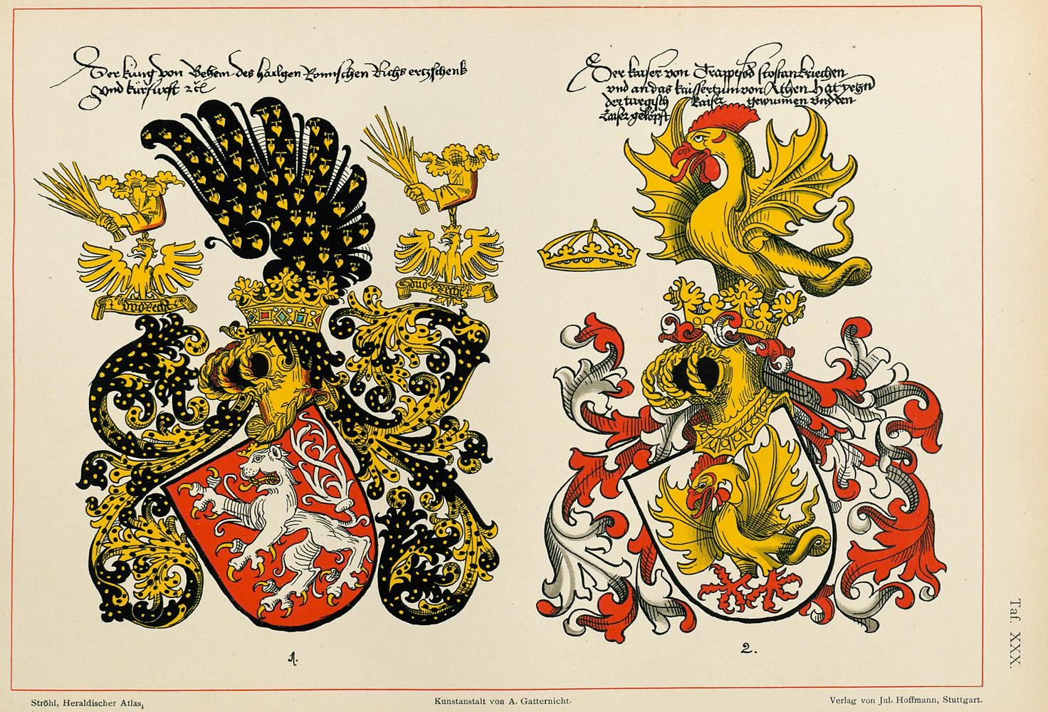 Hugo Gerhard Ströhl: "Heraldischer Atlas". Stuttgart 1899. Tafel 30 "Proben aus Conrad Grünenbergs Wappenbuch (1483)", Tafel: König von Böhmen, Kaiser von Trapezunt